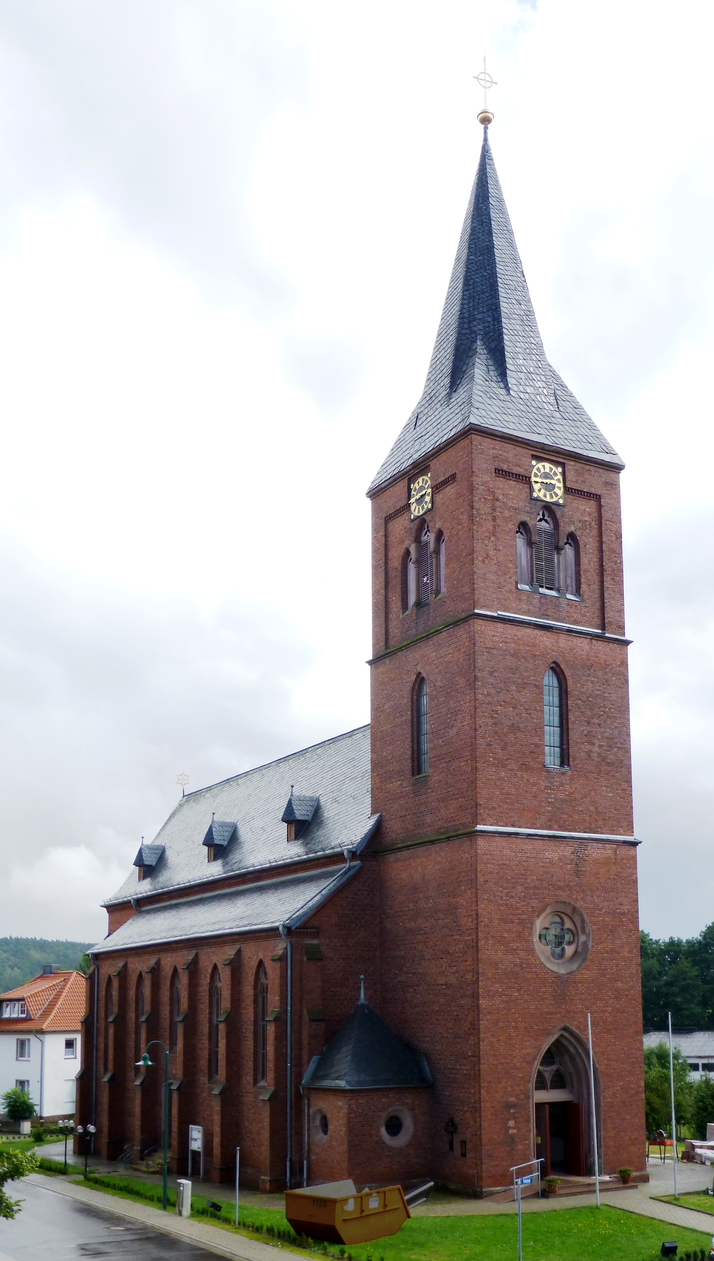 Kath. Pfarrkirche St. Stephanus in Berlingerode, erbaut 1896-98 unter Pfarrer Johannes Guempel, eingeweiht durch den Paderborner Weihbischof Augustin Gockel am 15. August 1898